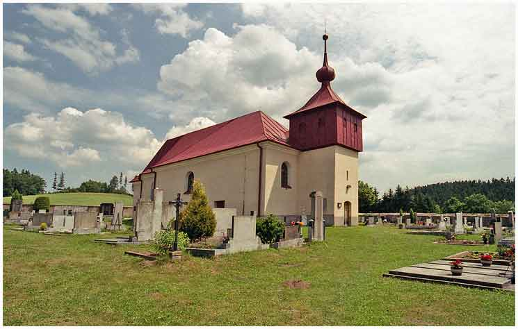 Kostel Svaté Kateřiny u Stříbrných hor